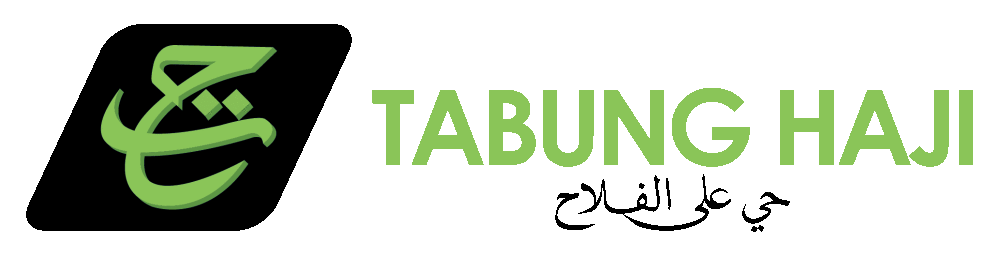 LOGO TH 2017